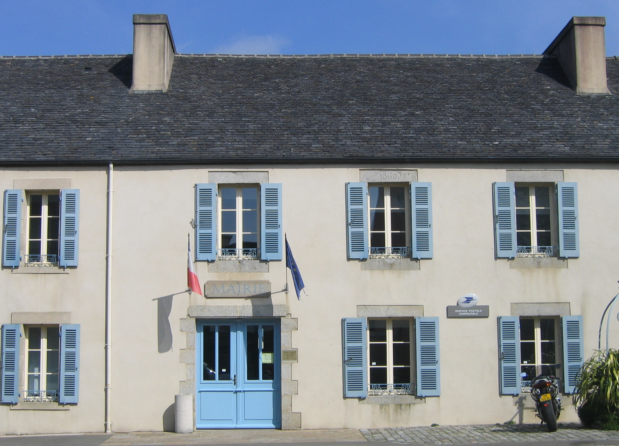 Mairie de Lampaul-Guimiliau dans le Finistère